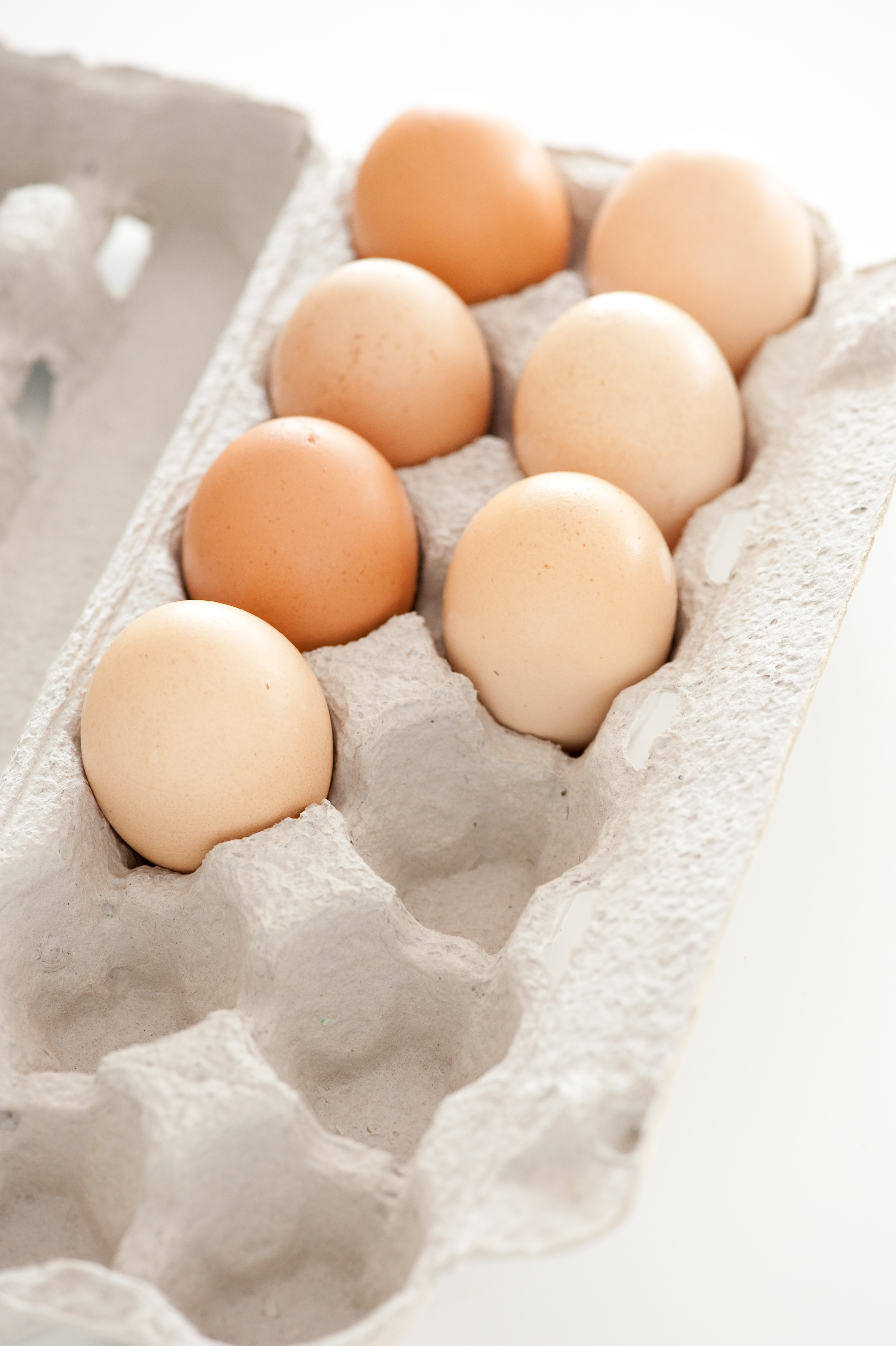 Huevos en una huevera.